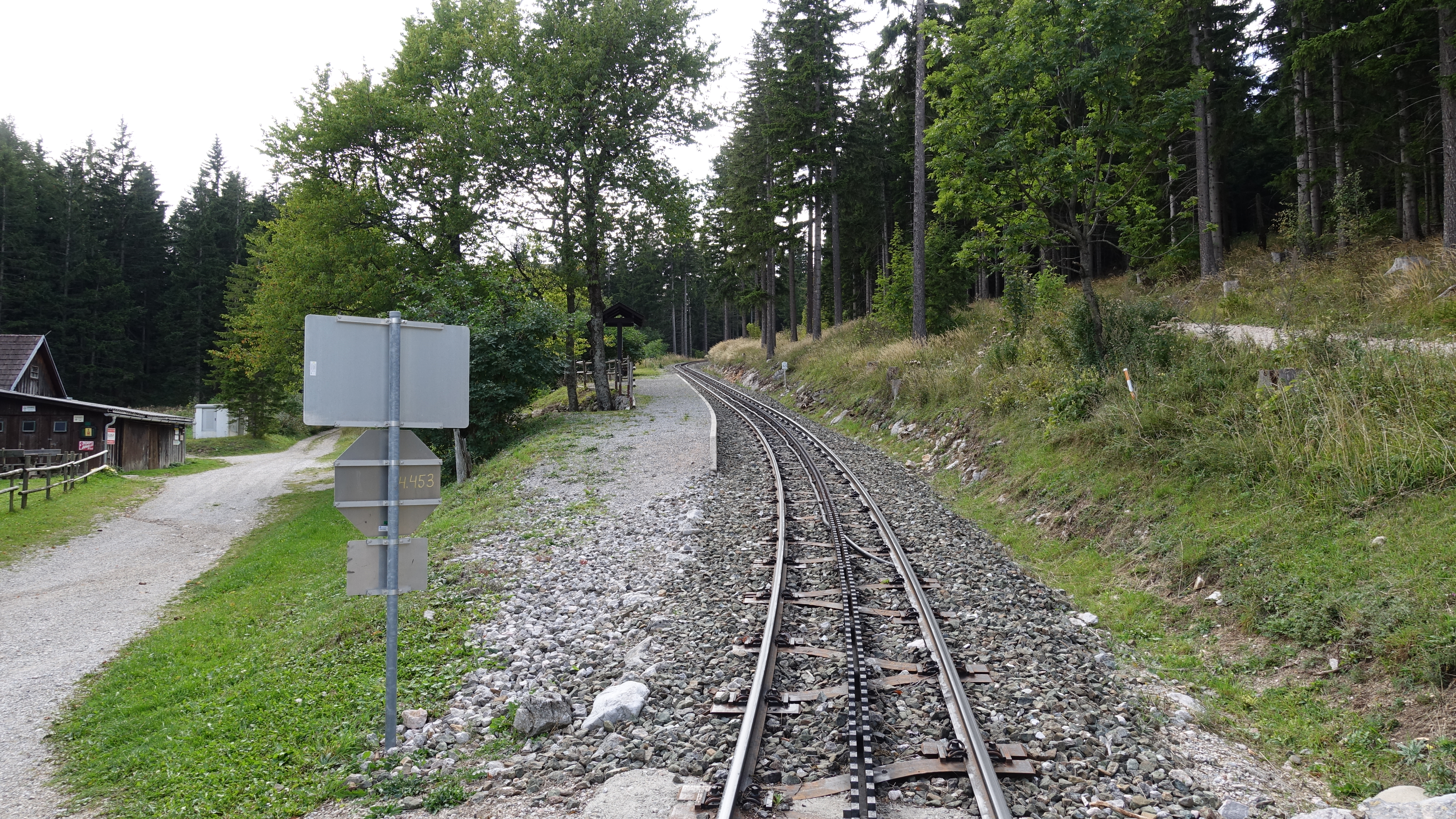 Schneeberg - Sept. 2019 - Haltestelle Hengsthütte